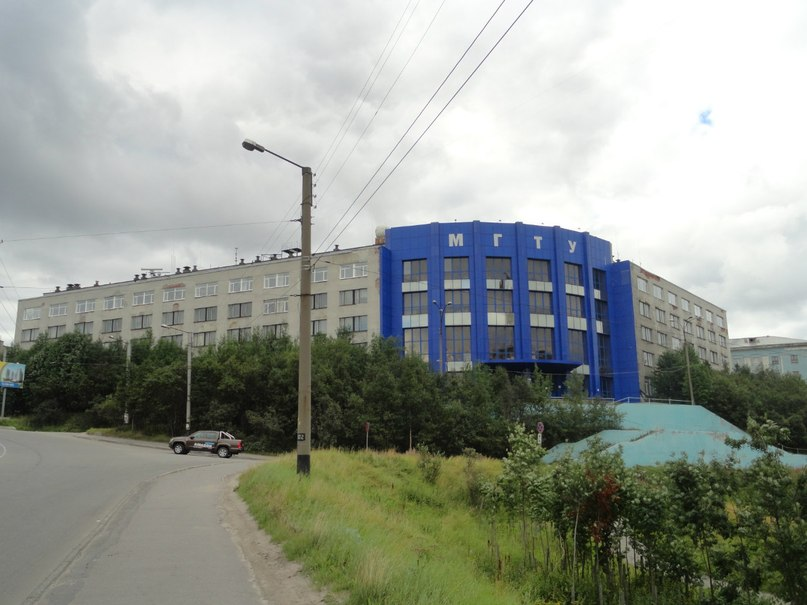 Мурманский государственный технический университет